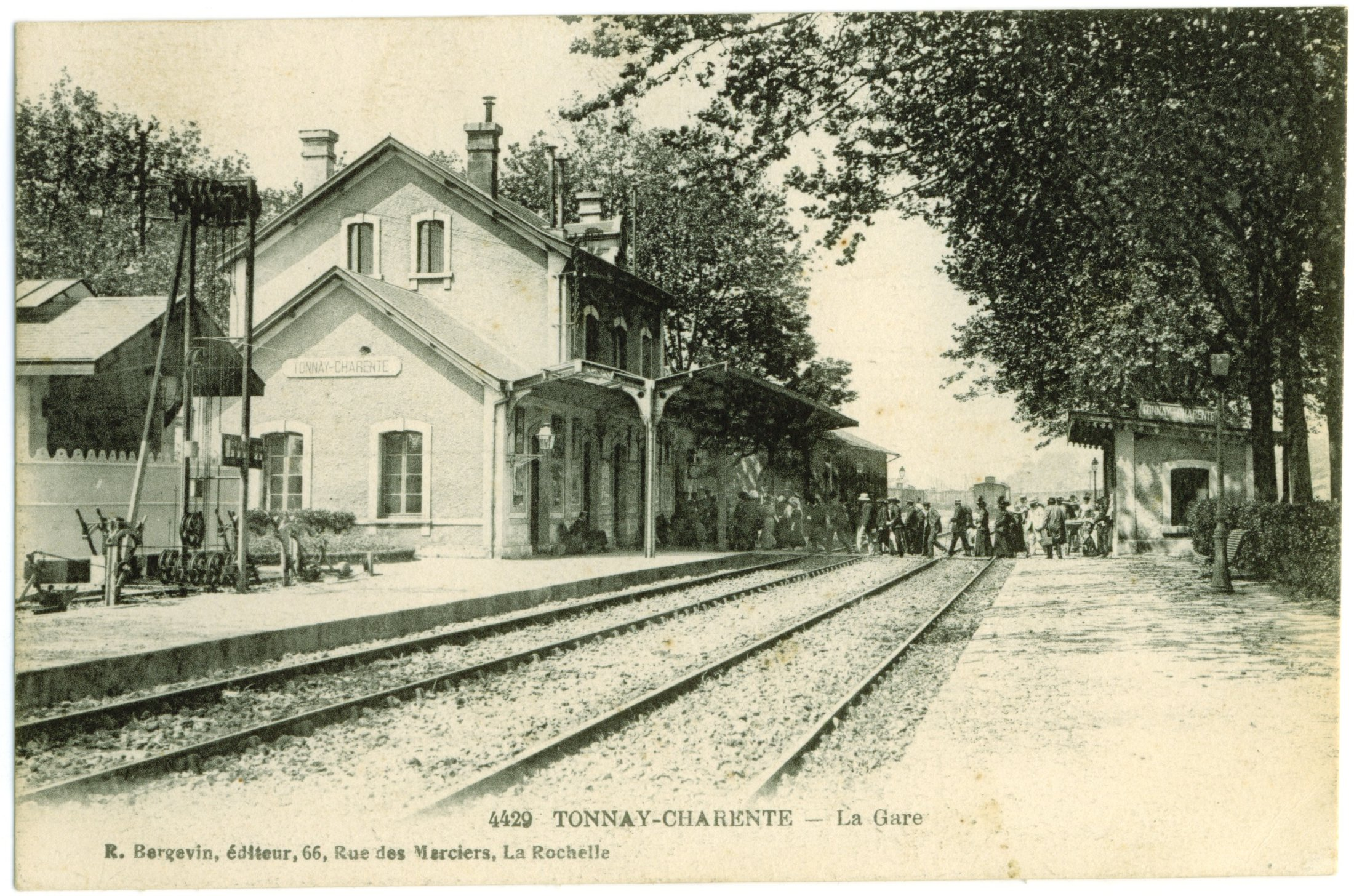 L'intérieur de la gare de Tonnay-Charente : le bâtiment voyageurs, quais et voies.